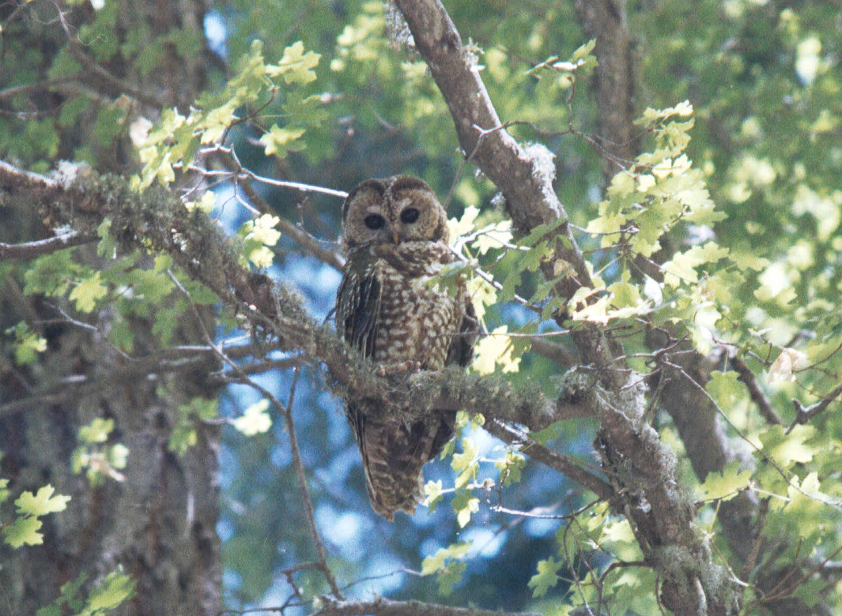 Mexican Spotted Owl Strix occidentalis lucida, Arizona 32.411° N 110.715° W